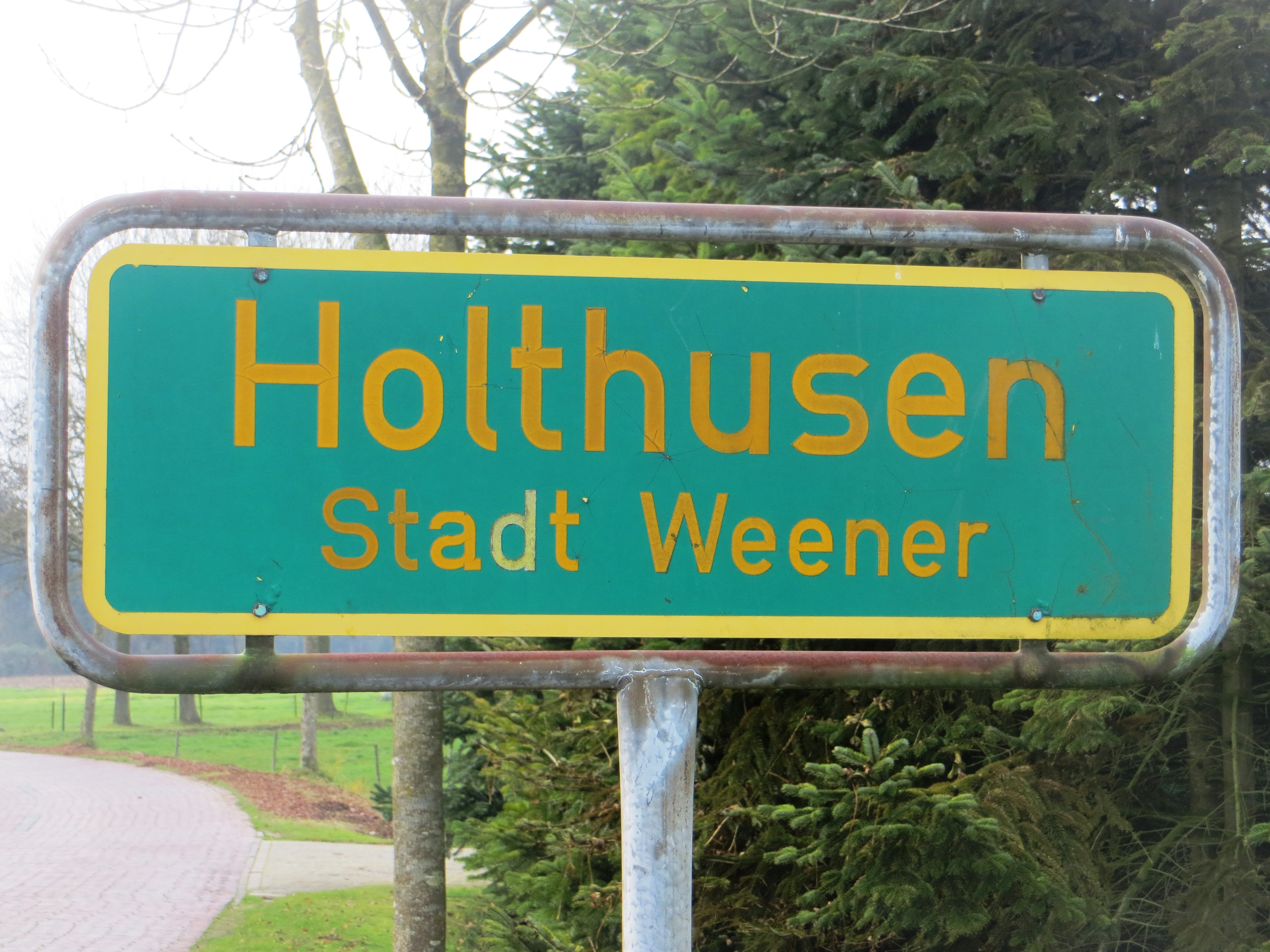 plaatsnaambord Holthusen